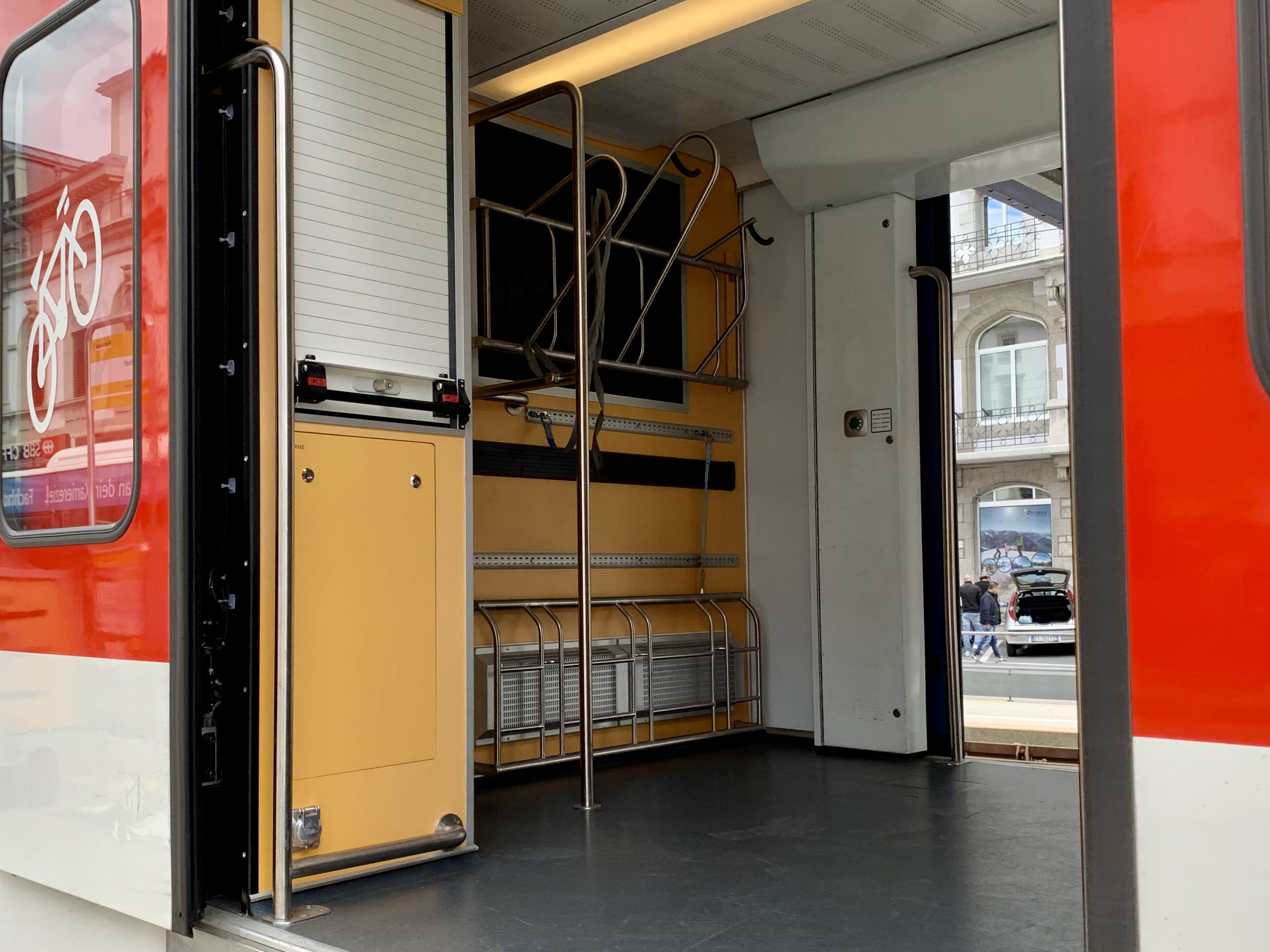 Gepäckabteil eines Komet der MGB.